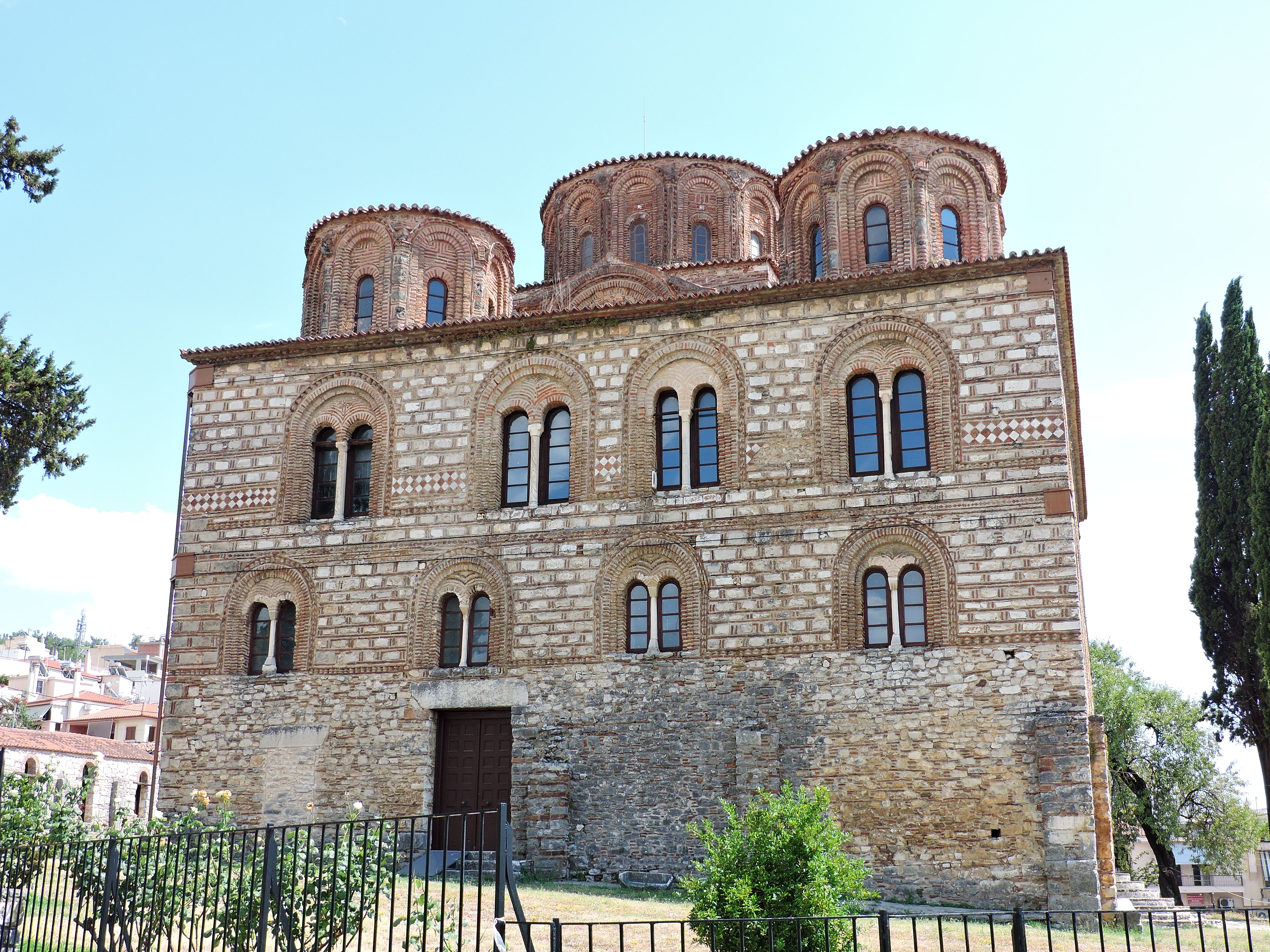 Η Παρηγορήτισσα Άρτας.